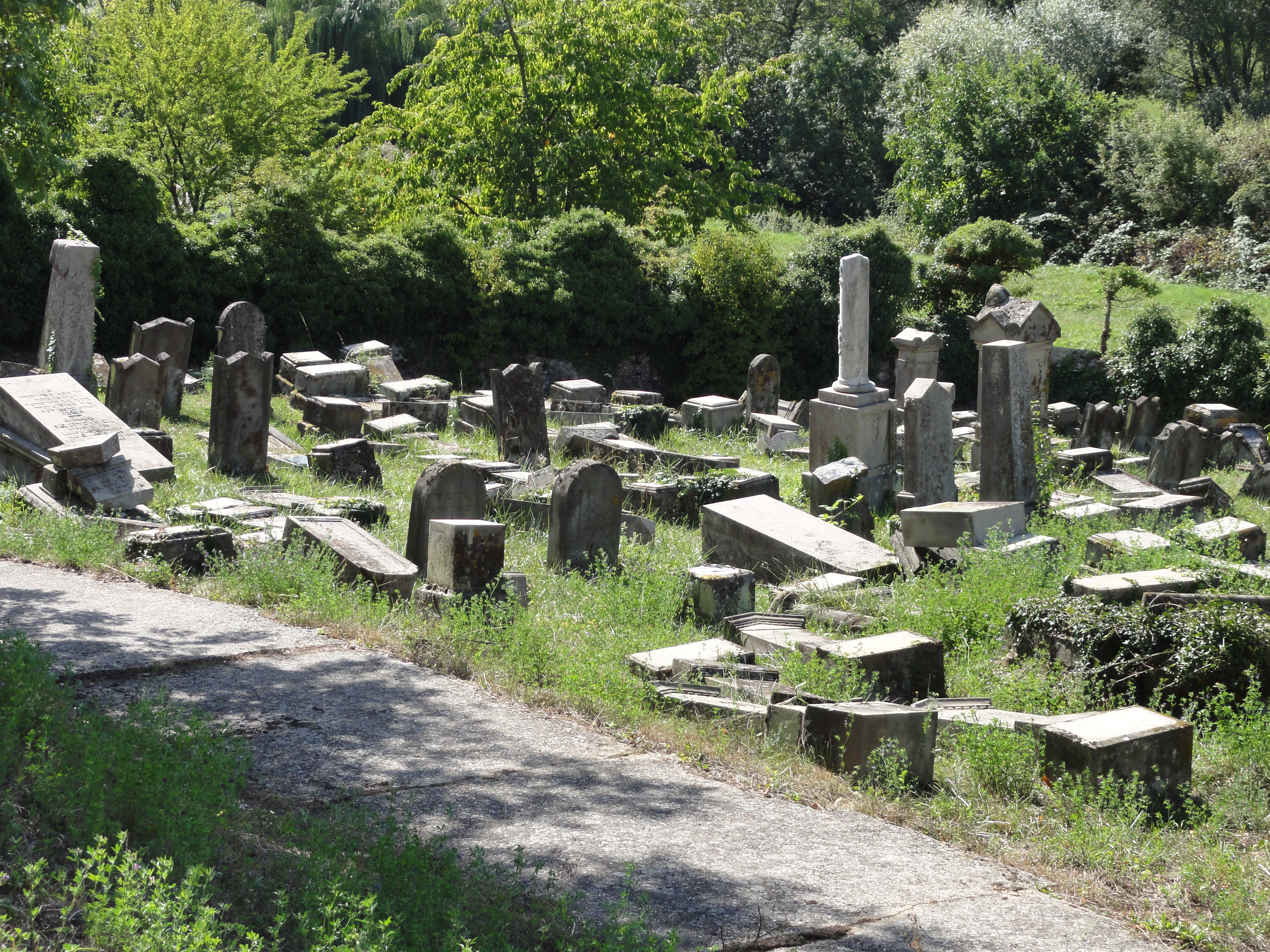 Alsace, Bas-Rhin, Sarre-Union, Cimetière juif avec pierres tombales.